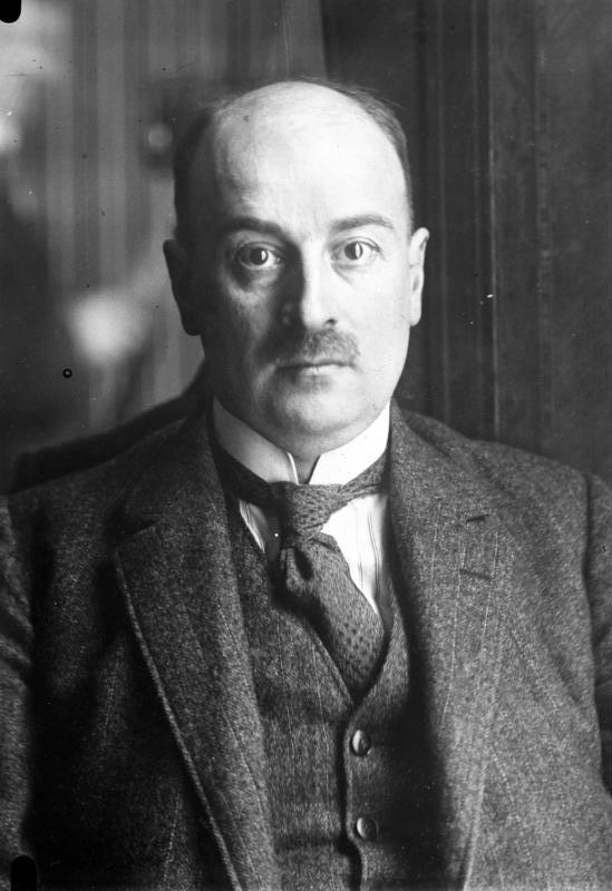 Staatssekretär a. D. Trendelenburg, wurde zum deutschen Untergeneralsekretär des Völkerbundes ernannt ! Untergeneralsekretär Trendelenburg hat die Oberleitung über die Finanz- und Wirtschaftsabteilung des Völkerbundes übernommen.